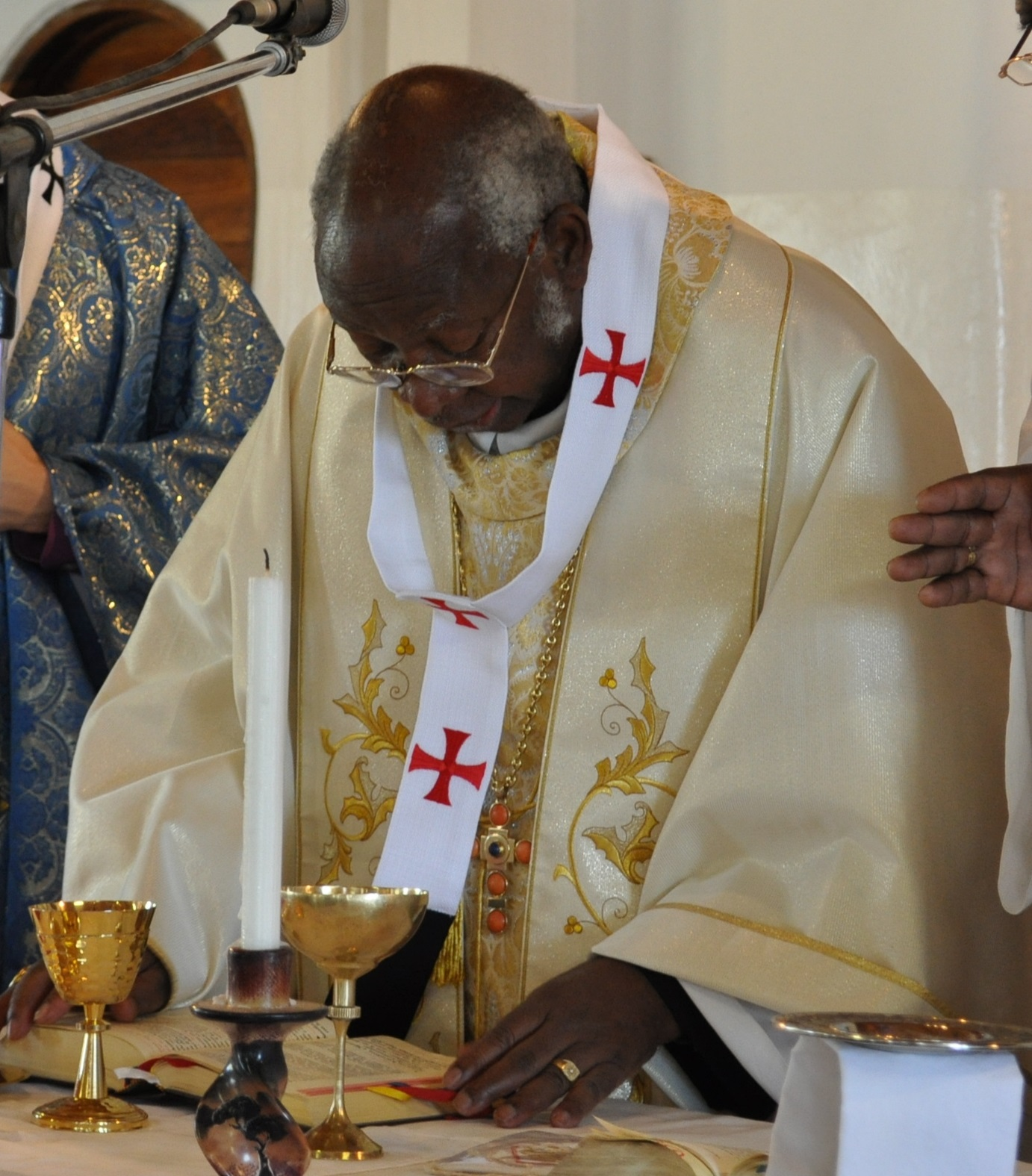 Mgr Emmanuel Milingo célébrant la Sainte Eucharistie le 29 juin 2009 à Lusaka en Zambie.